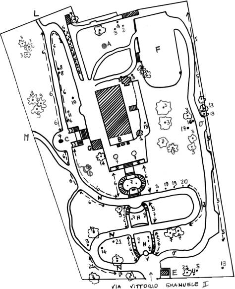 piantina del giardino di Villa Fabbricotti, Firenze